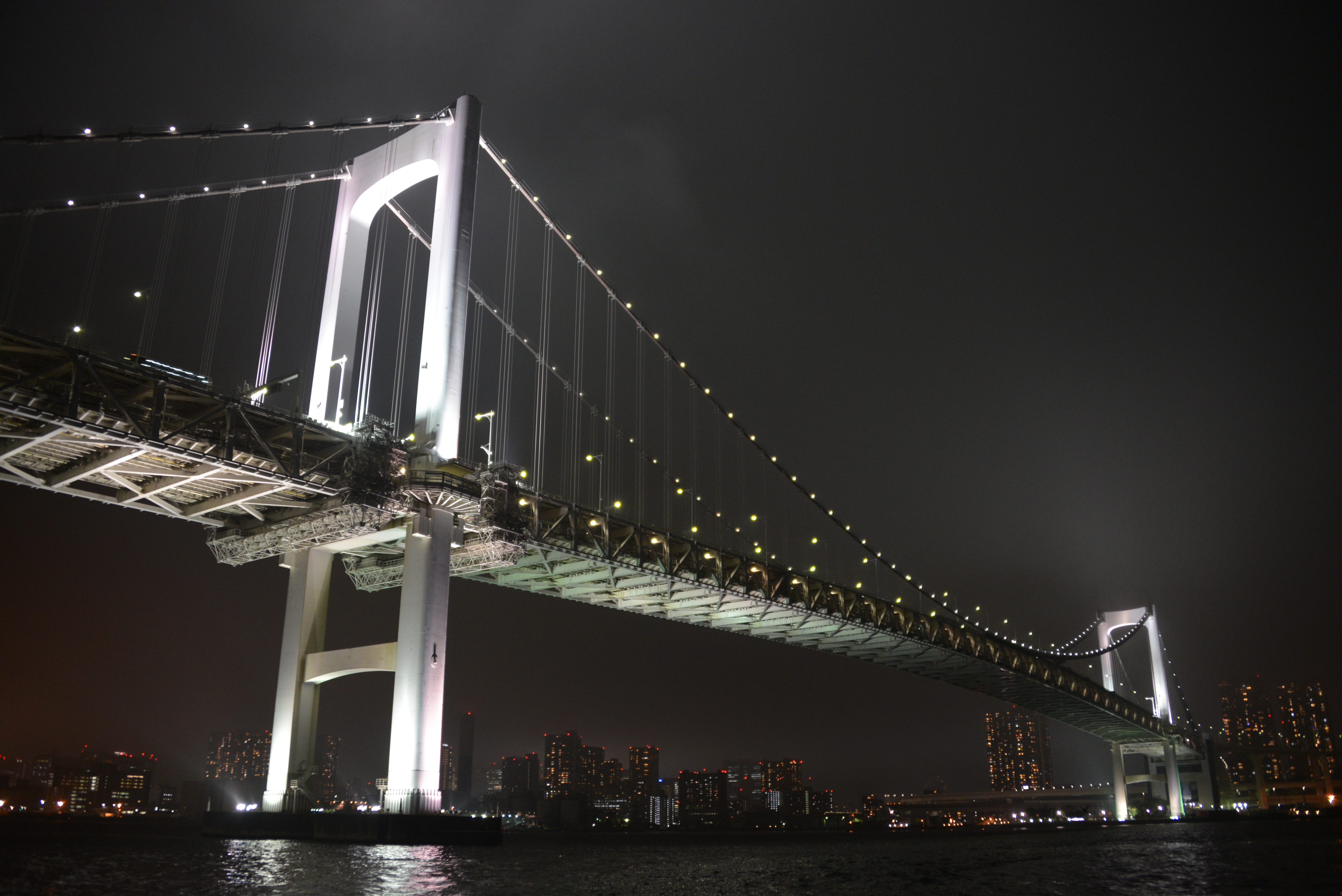 （夜景）（下から）